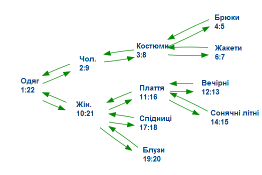 Ілюстрація до статті "Модель вкладених множин"